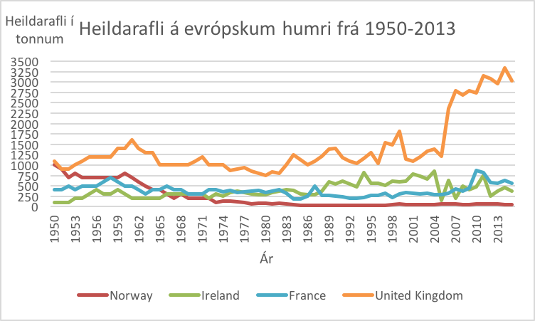 Heildarafli á Evrópskum humri frá 1950-2013 eftir helstu veiðiþjóðum.